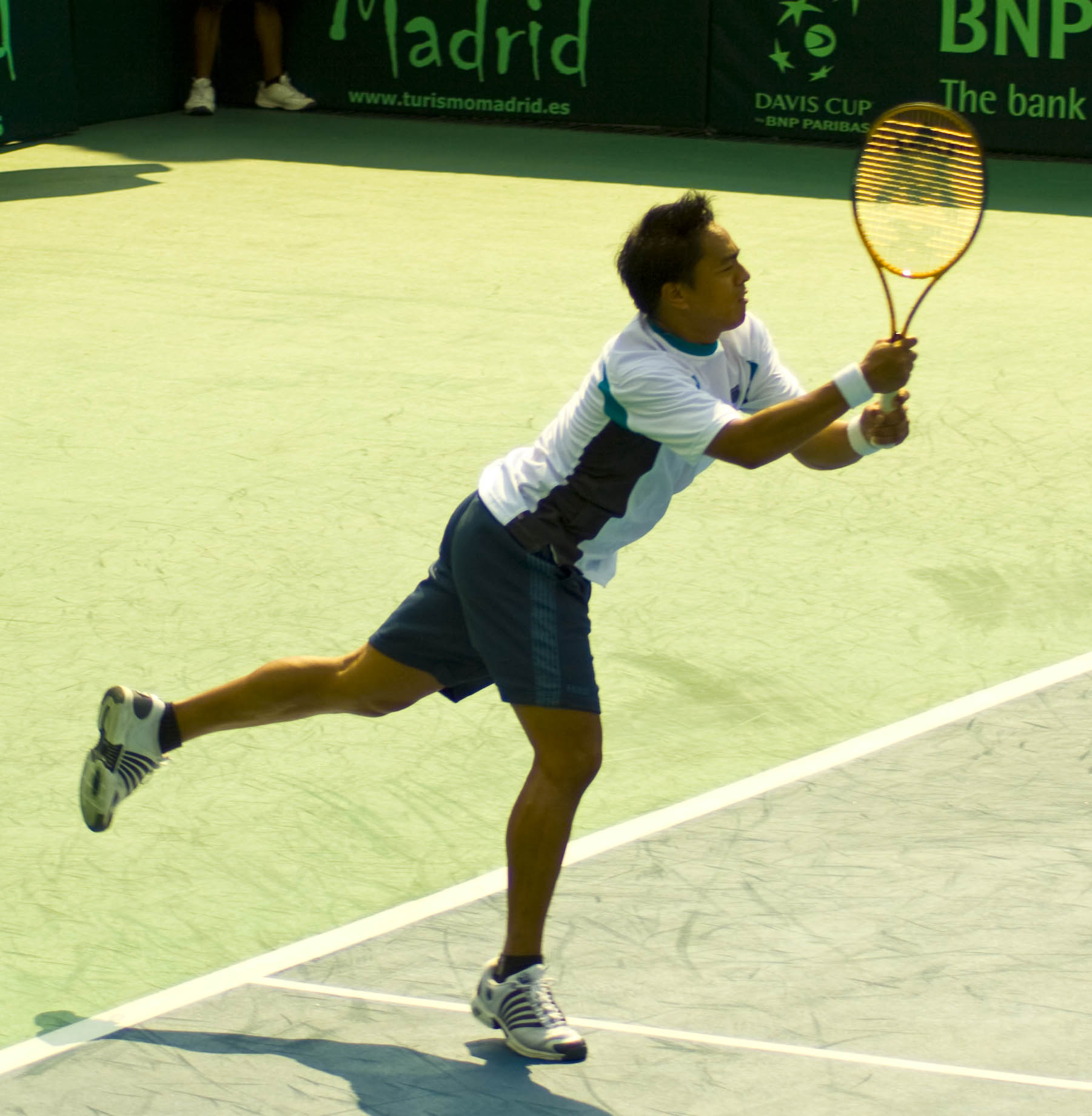 Le joueur de tennis Eric Taino